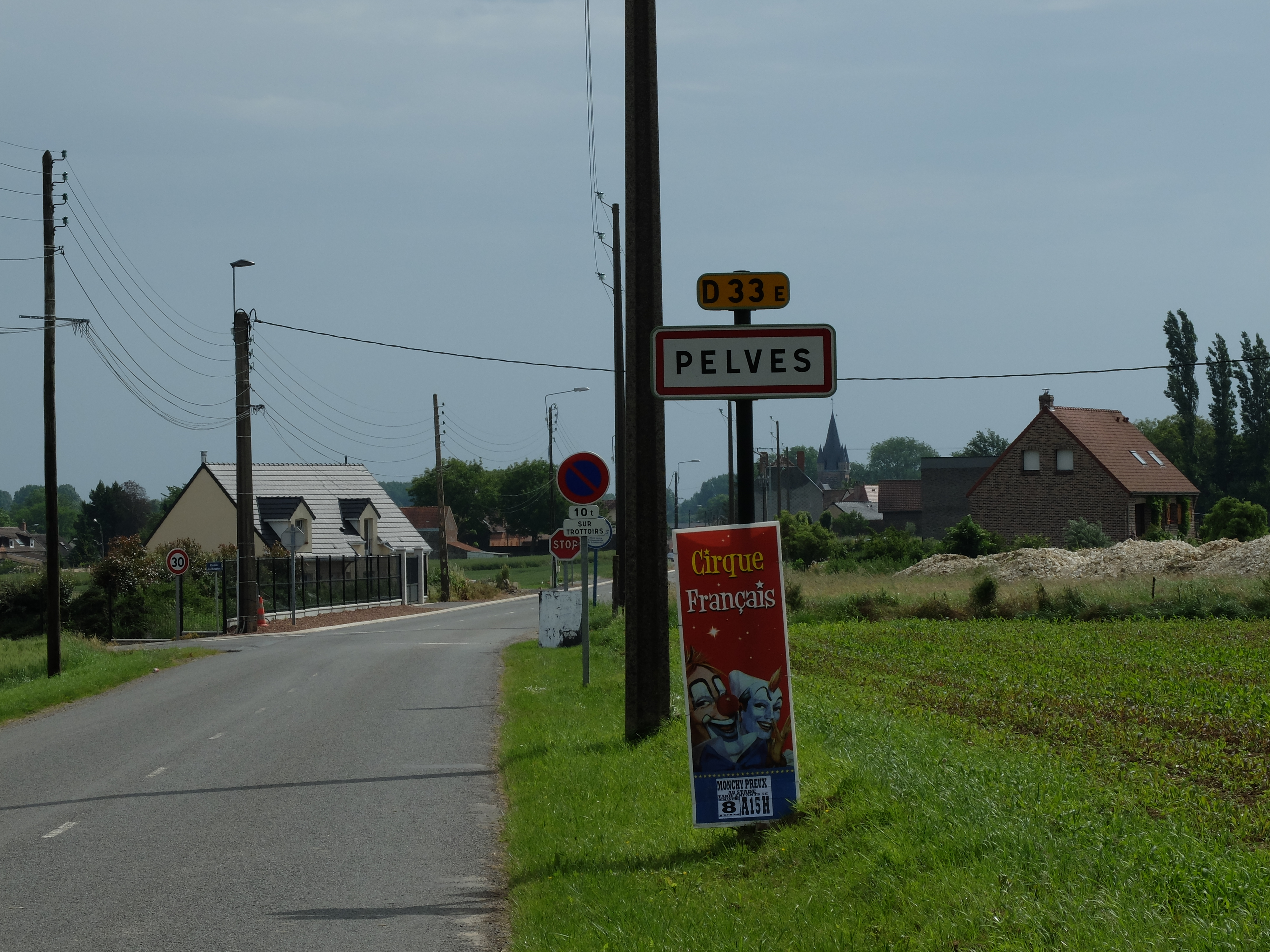 Vue d'une entrée de la commune de Pelves.